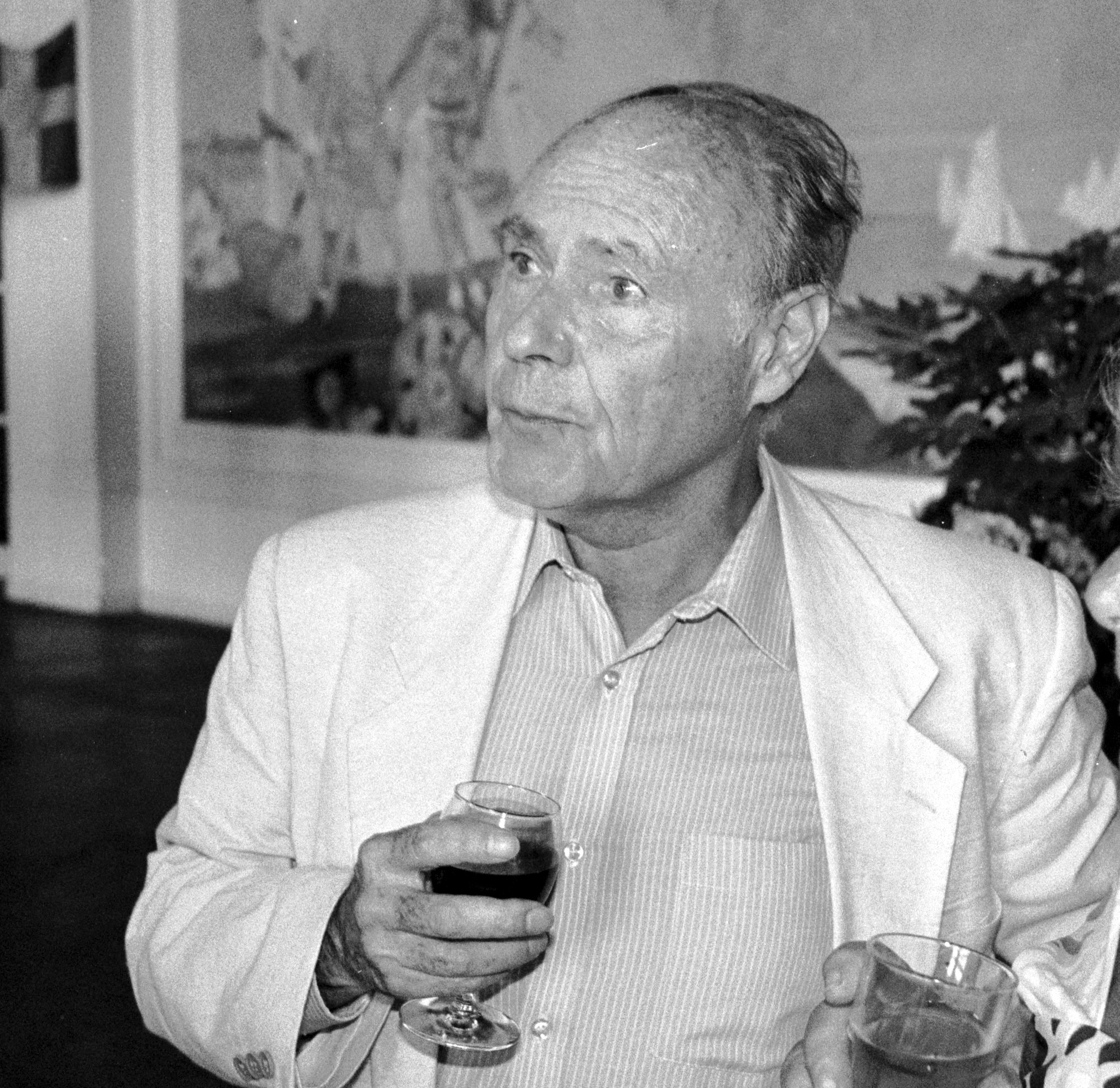 L'écrivain français René de Obaldia à Trouville-sur-Mer (Calvados, France).